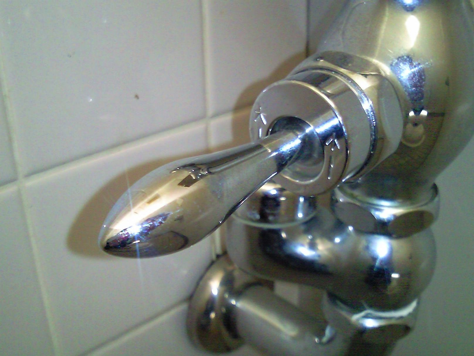 TOTO TV180